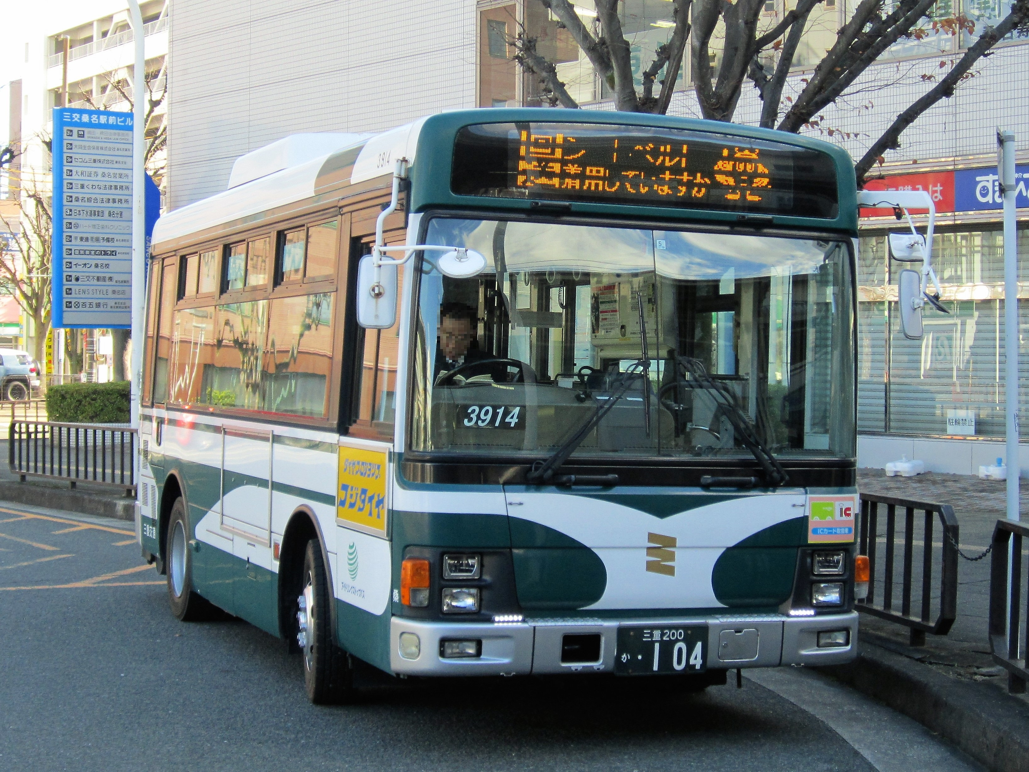 桑名駅前に停車中の三重交通バス Canon PowerShot A2200